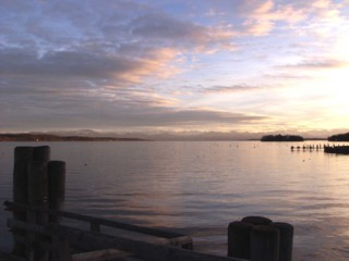 Blick vom Possenhofener Dampfersteg zur Roseninsel